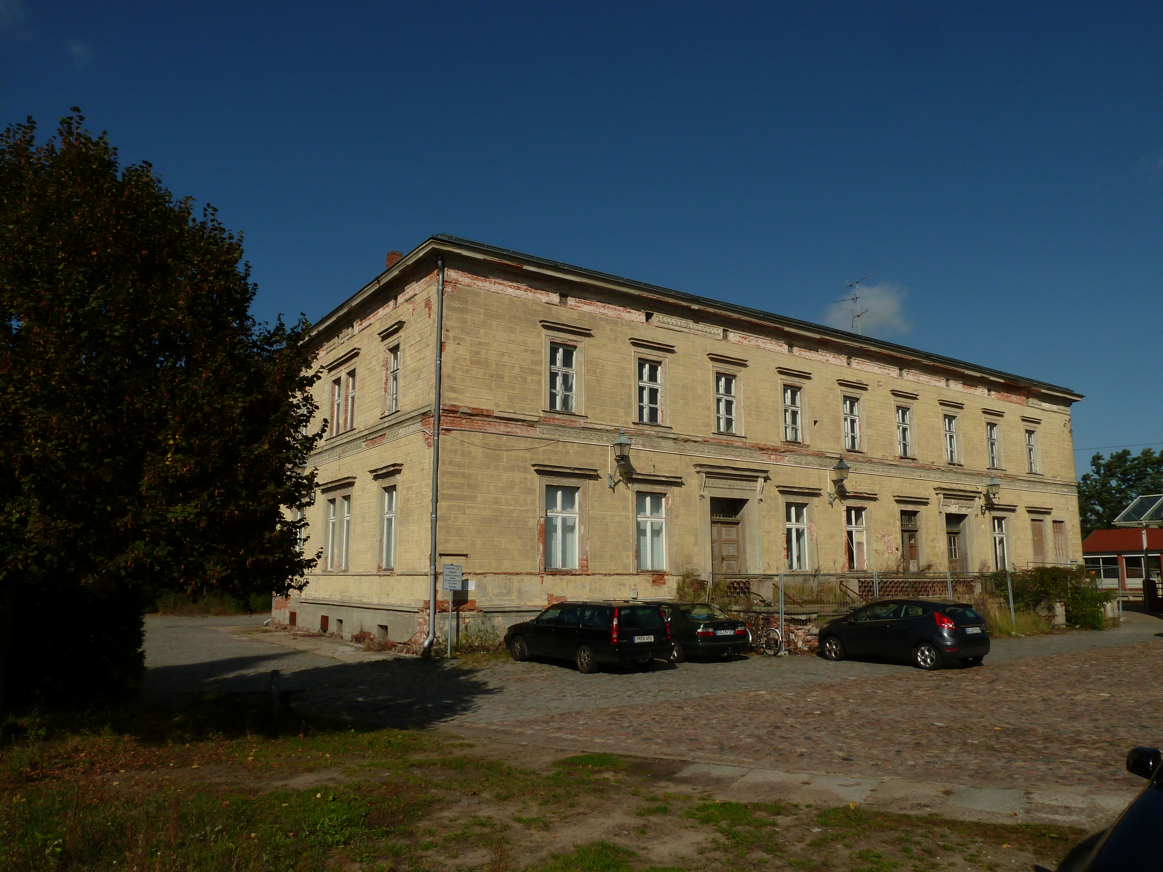 Bahnhof Glöwen (Baudenkmal), Straßenseite